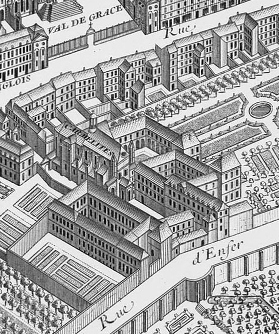 La couvent des carmélites du faubourg Saint-Jacques extrait du plan de Paris de Turgot, 1734